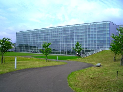 Future University-Hakodate. Hakodate, Hokkaido, JAPAN.